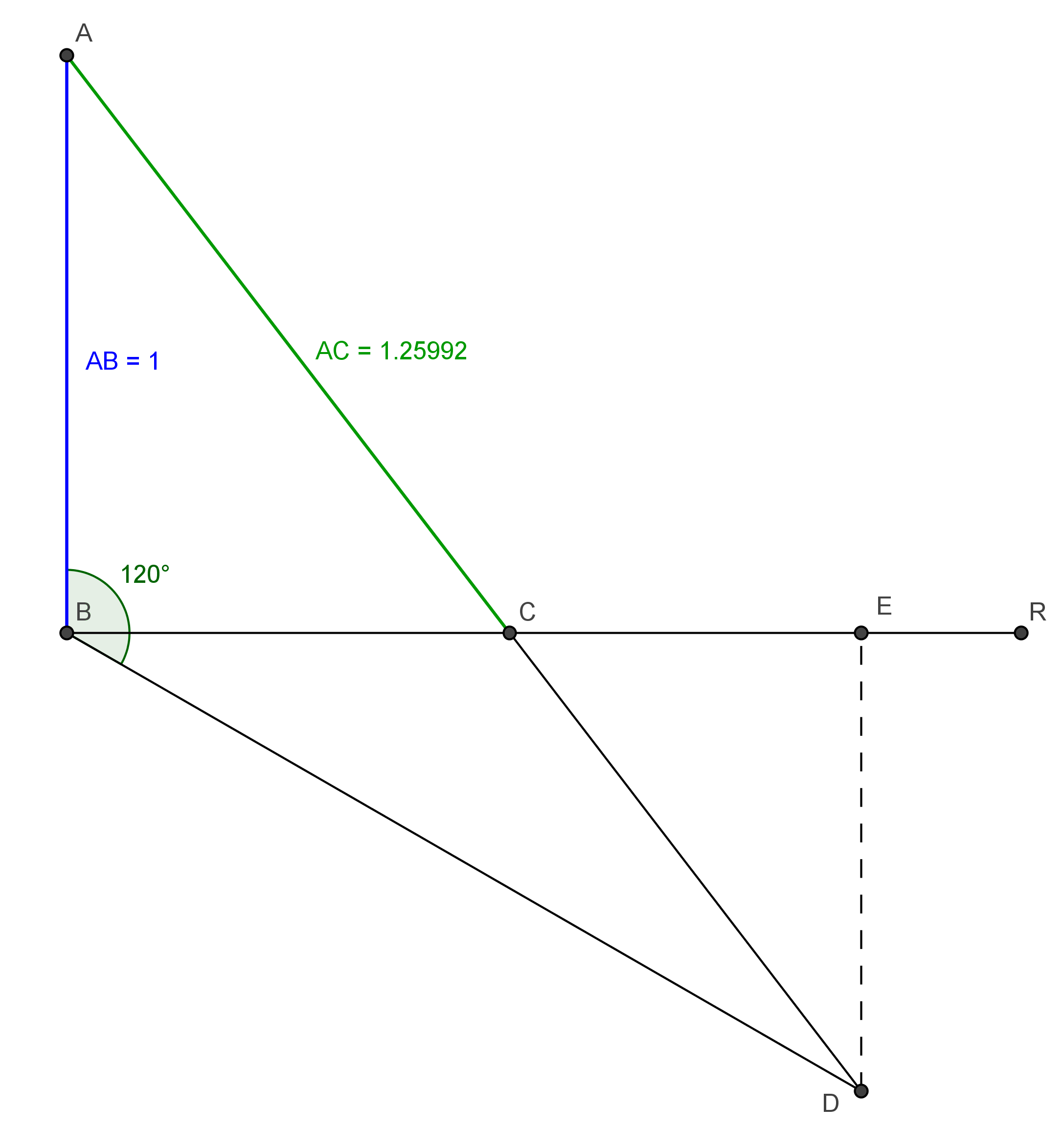 Duplicació del cub